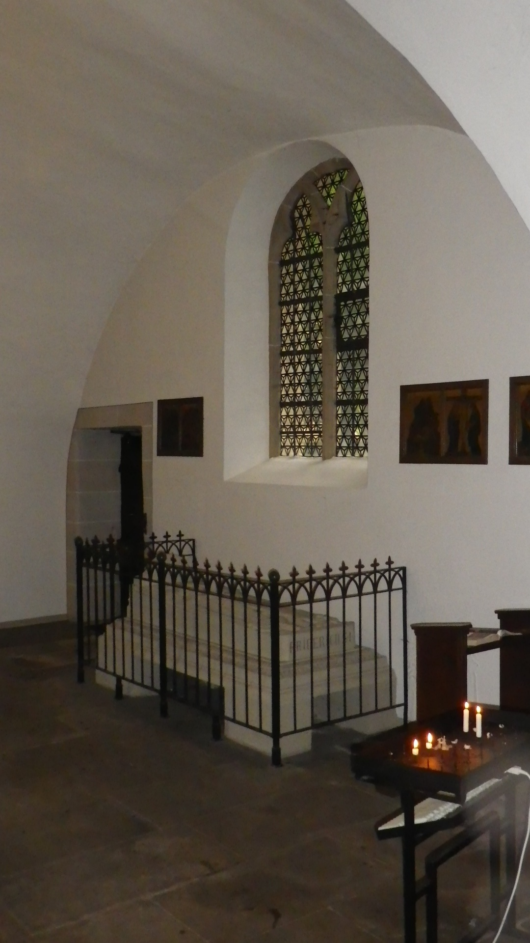 Blick auf die Grabstätte der Erphokapelle (Nordseite)